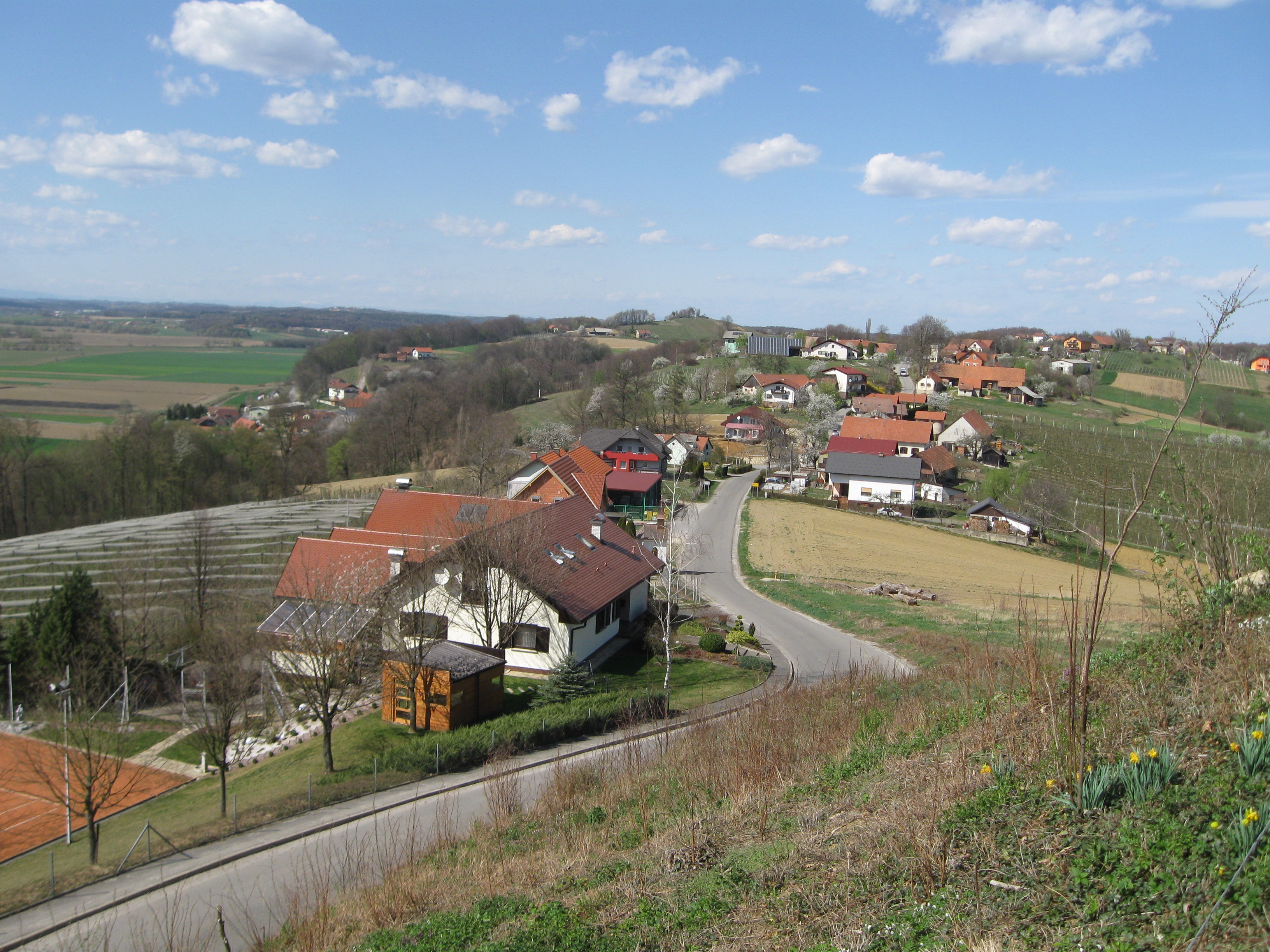 Naselje Drbetinci slikano izpred cerkve Sv Andrej v Vitomarcih.